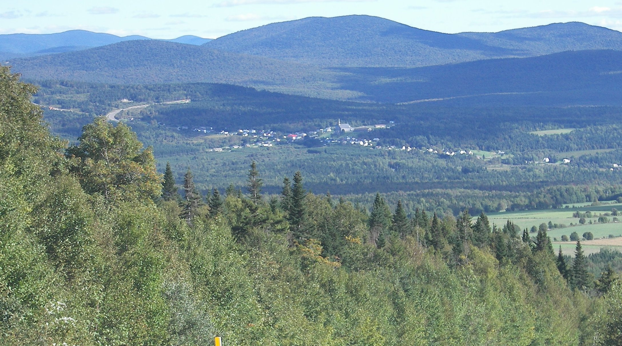 Village de Notre-Dame des Bois Vue du chemin du Mont Megantic